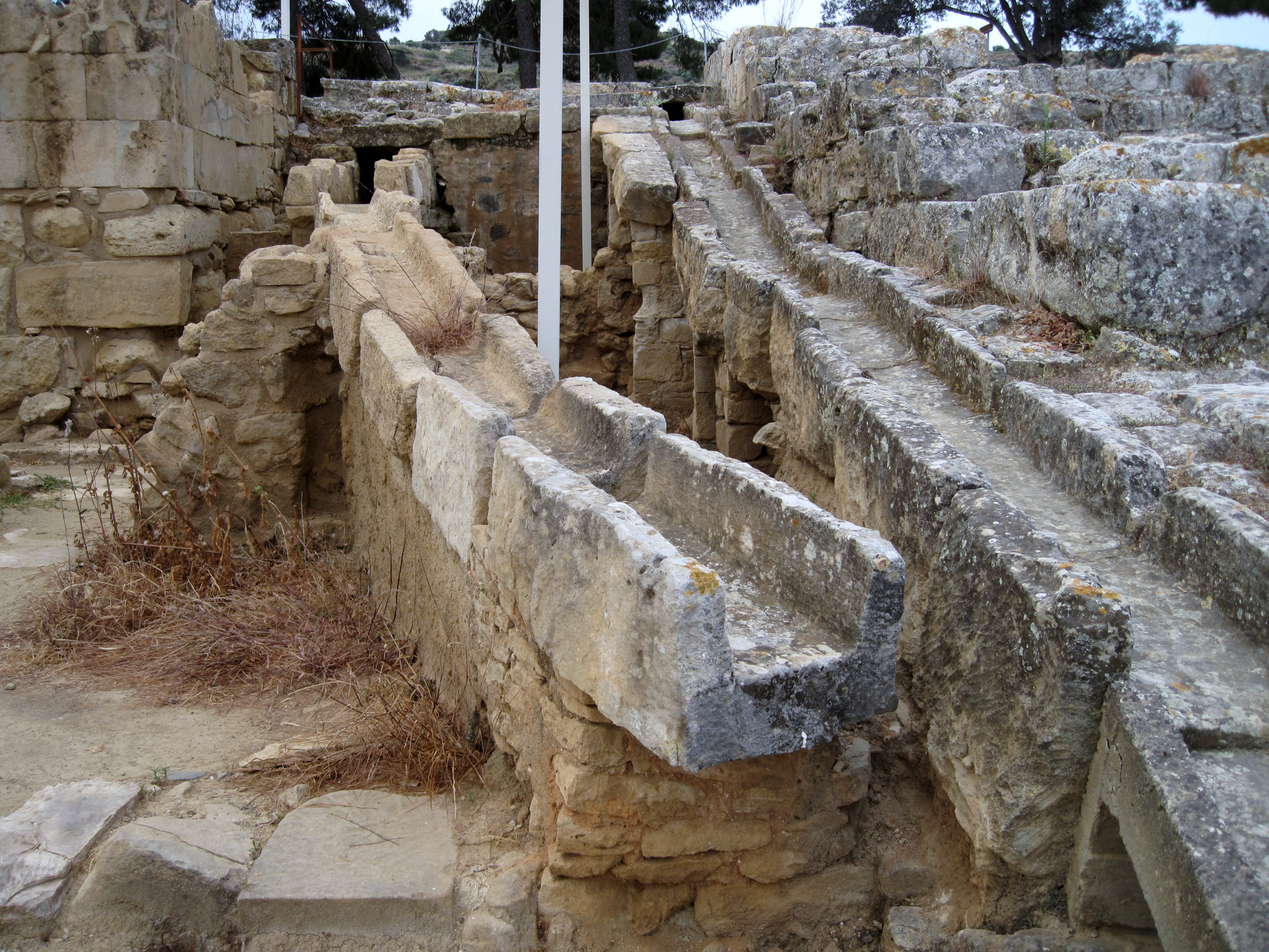 Ausgrabungsstätte von Agia Triada in der Gemeinde Festos, Regionalbezirk Iraklio, Kreta, Griechenland